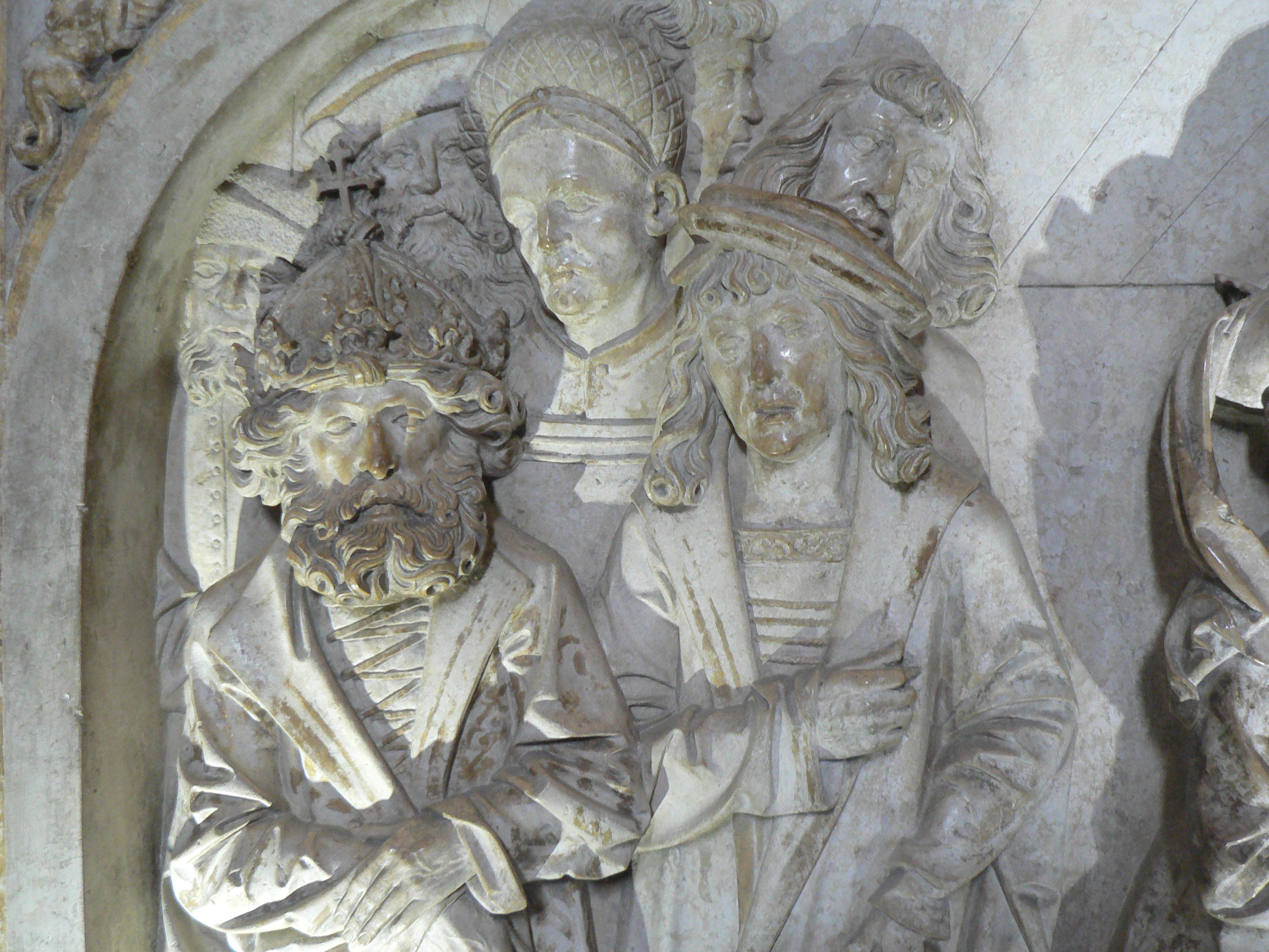 eigene Datei